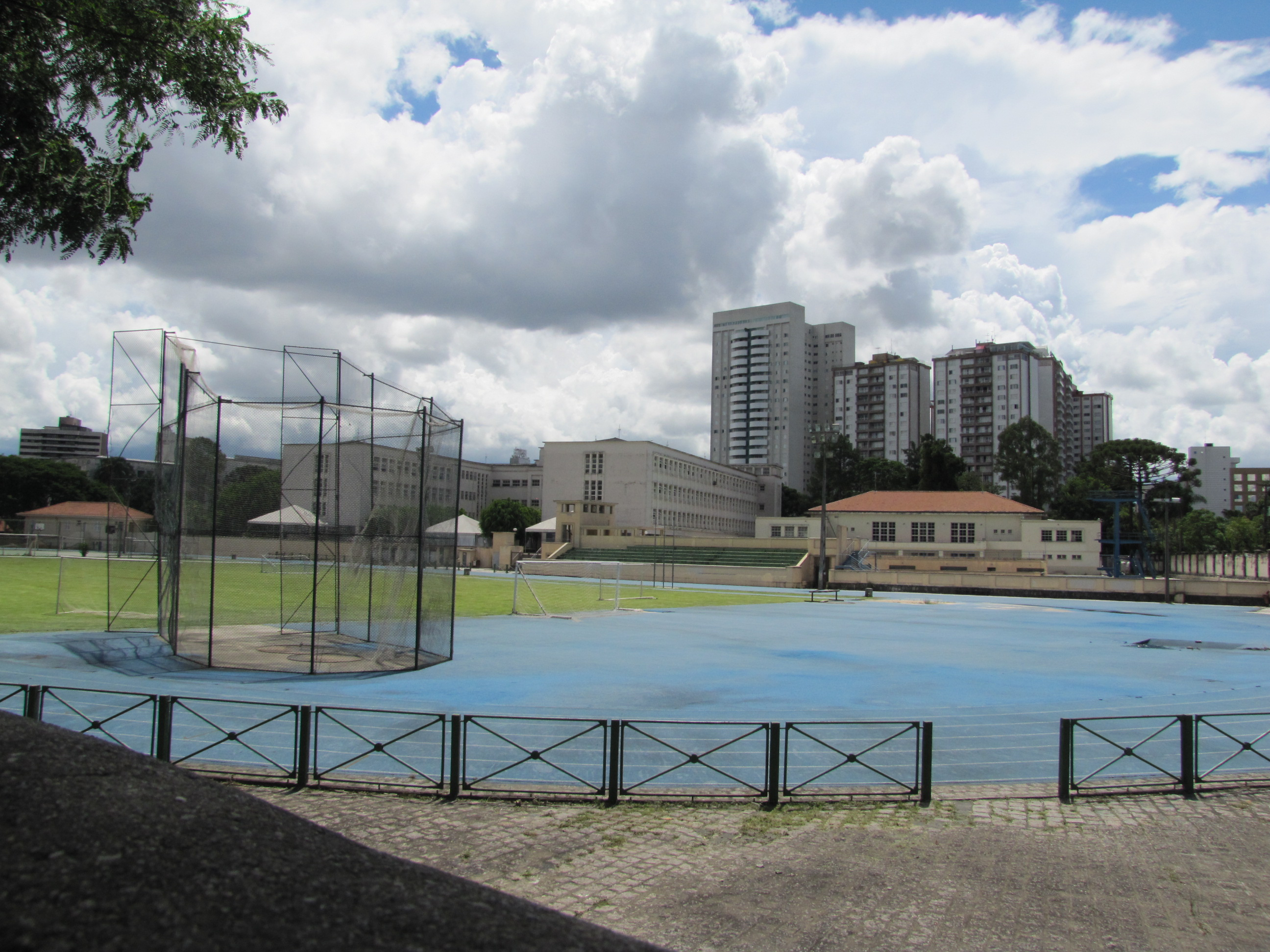 Praça de esportes do Colégio Estadual do Paraná - Brasil.